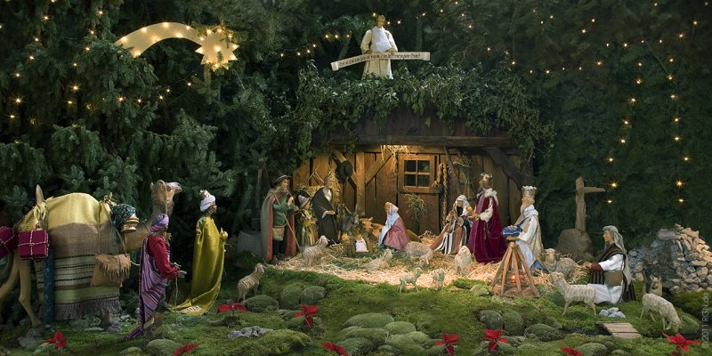 Die große Krippe in der Kirche St. Silvester zu Erle im Westmünsterland